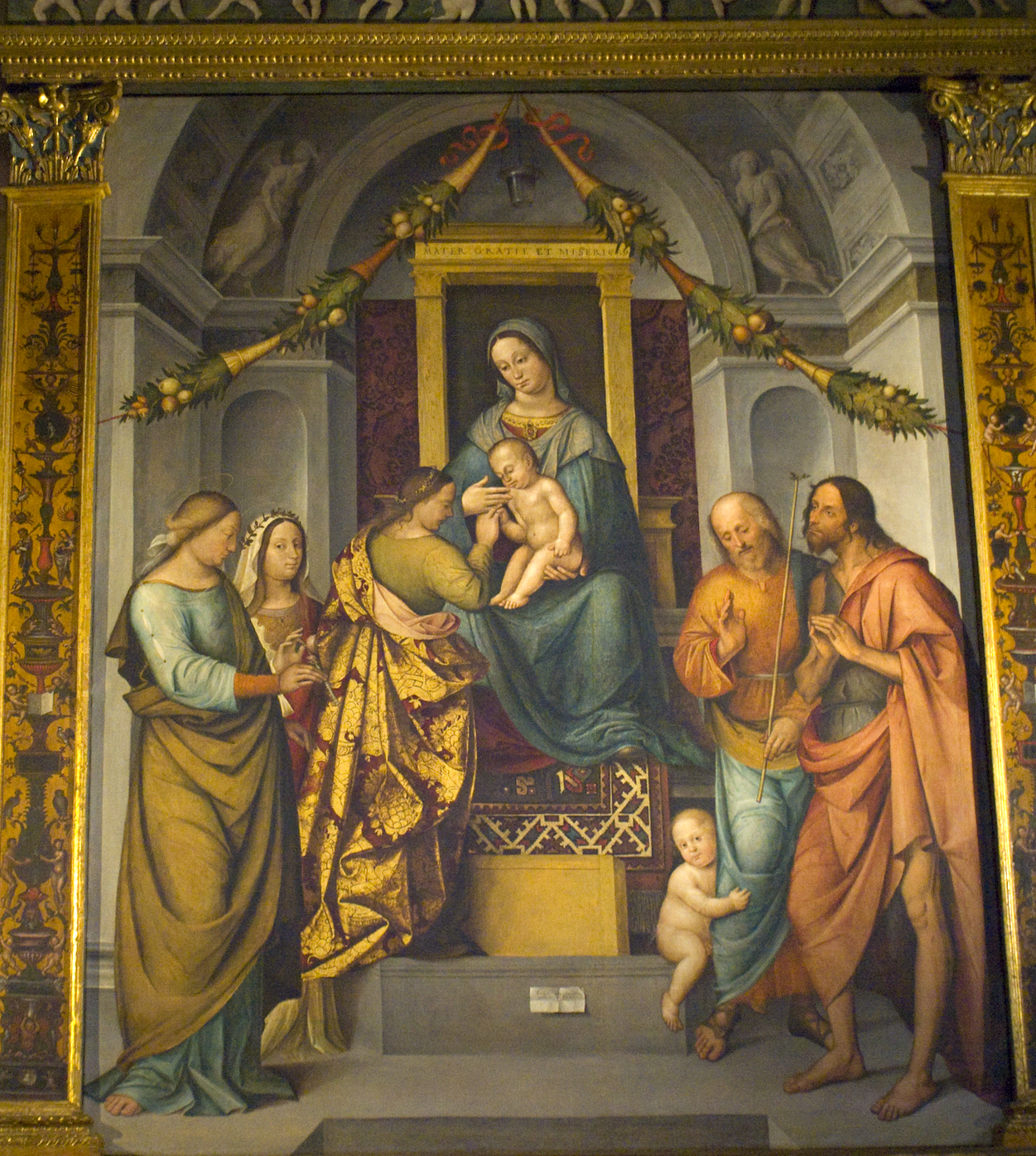 Chiesa di San Francesco This is a photo of a monument which is part of cultural heritage of Italy.